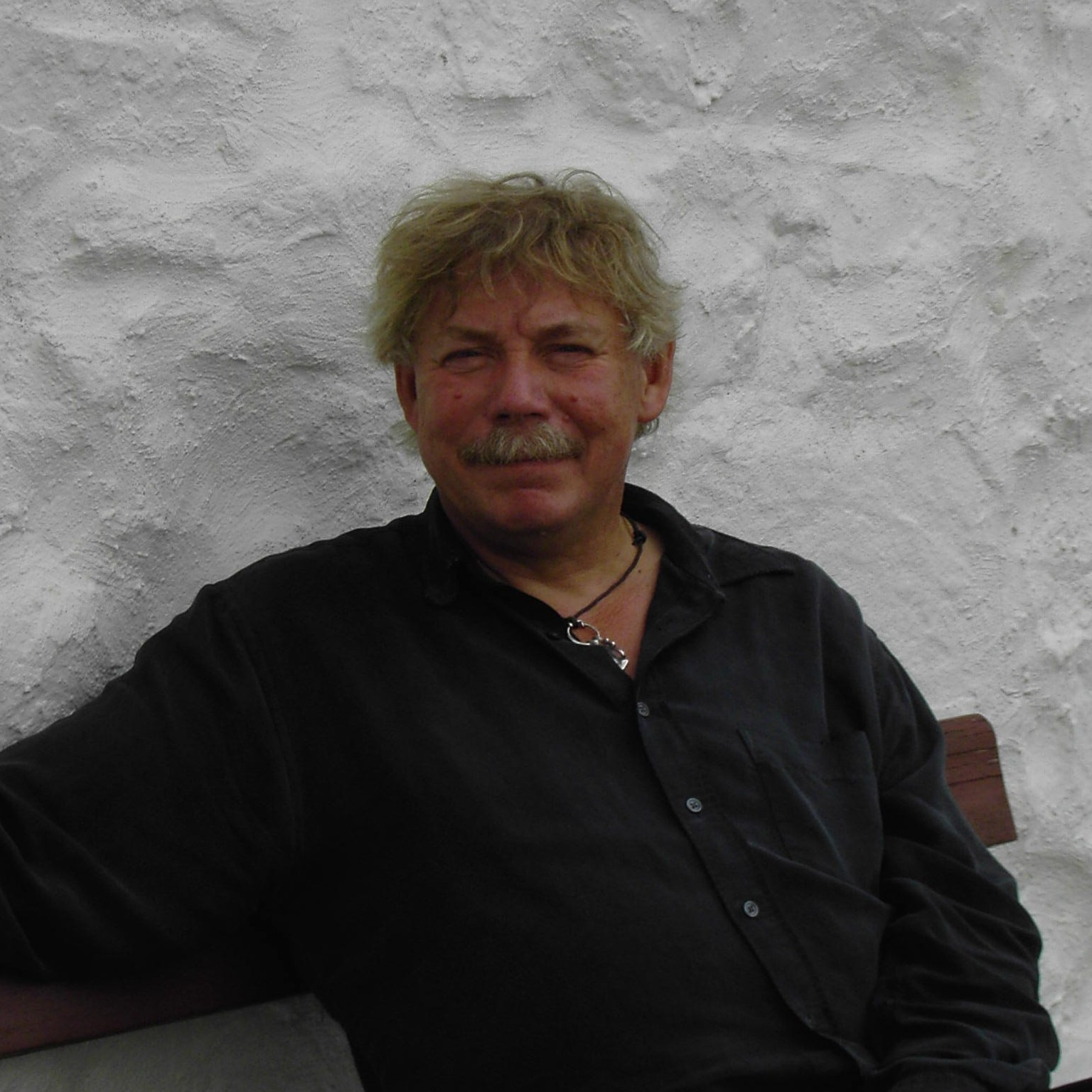 komponisten på Fair Isle